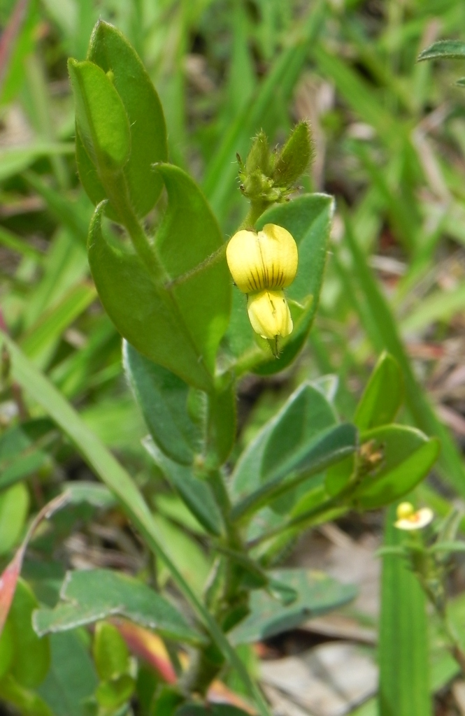 Crotalaria stipularia Desv. FABACEAE - Parque Olhos D'Água - Brasília - Distrito Federal - Brasil.